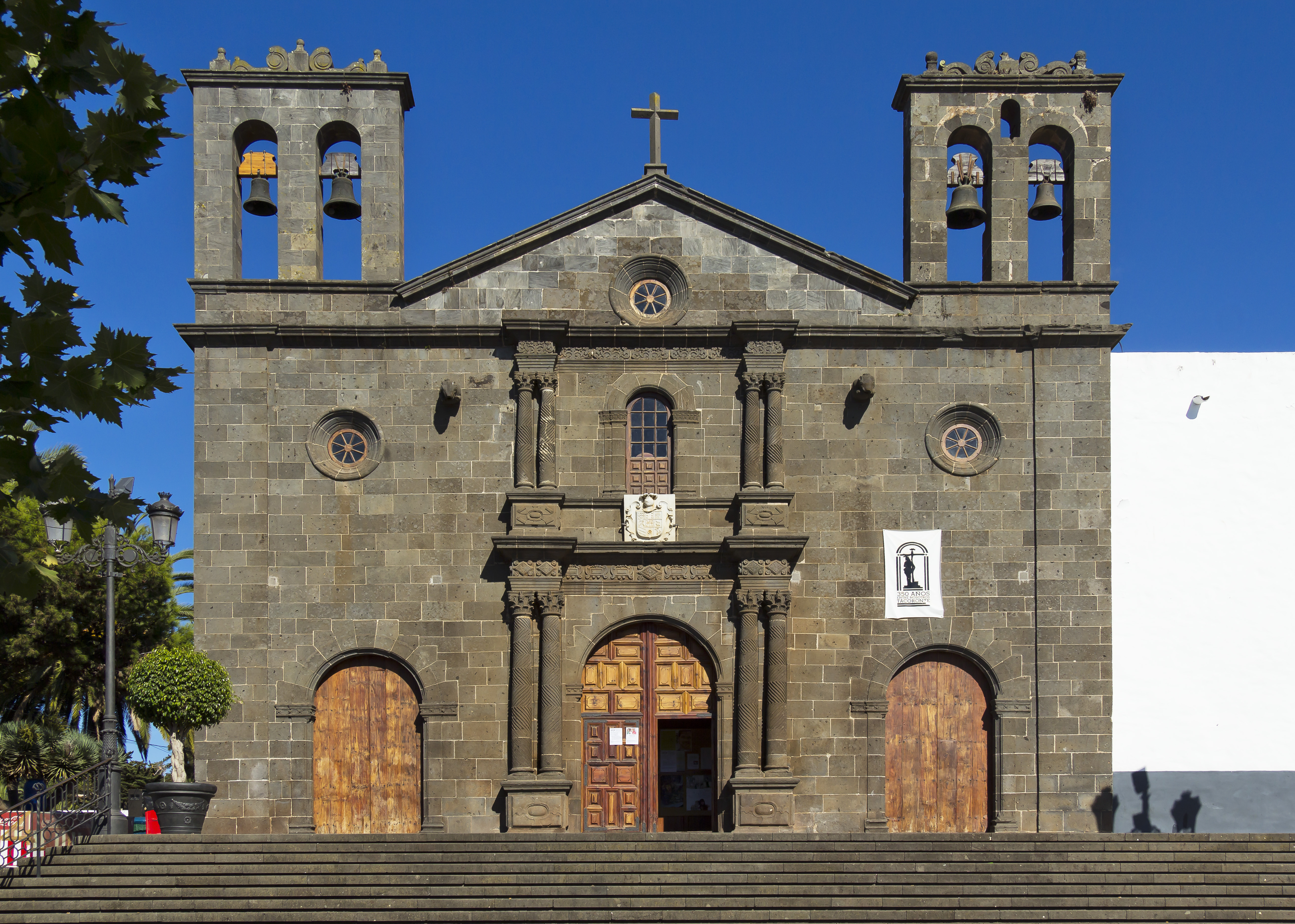 Westfassade der Kirche des ehemaligen Augustinerklosters in Tacoronte